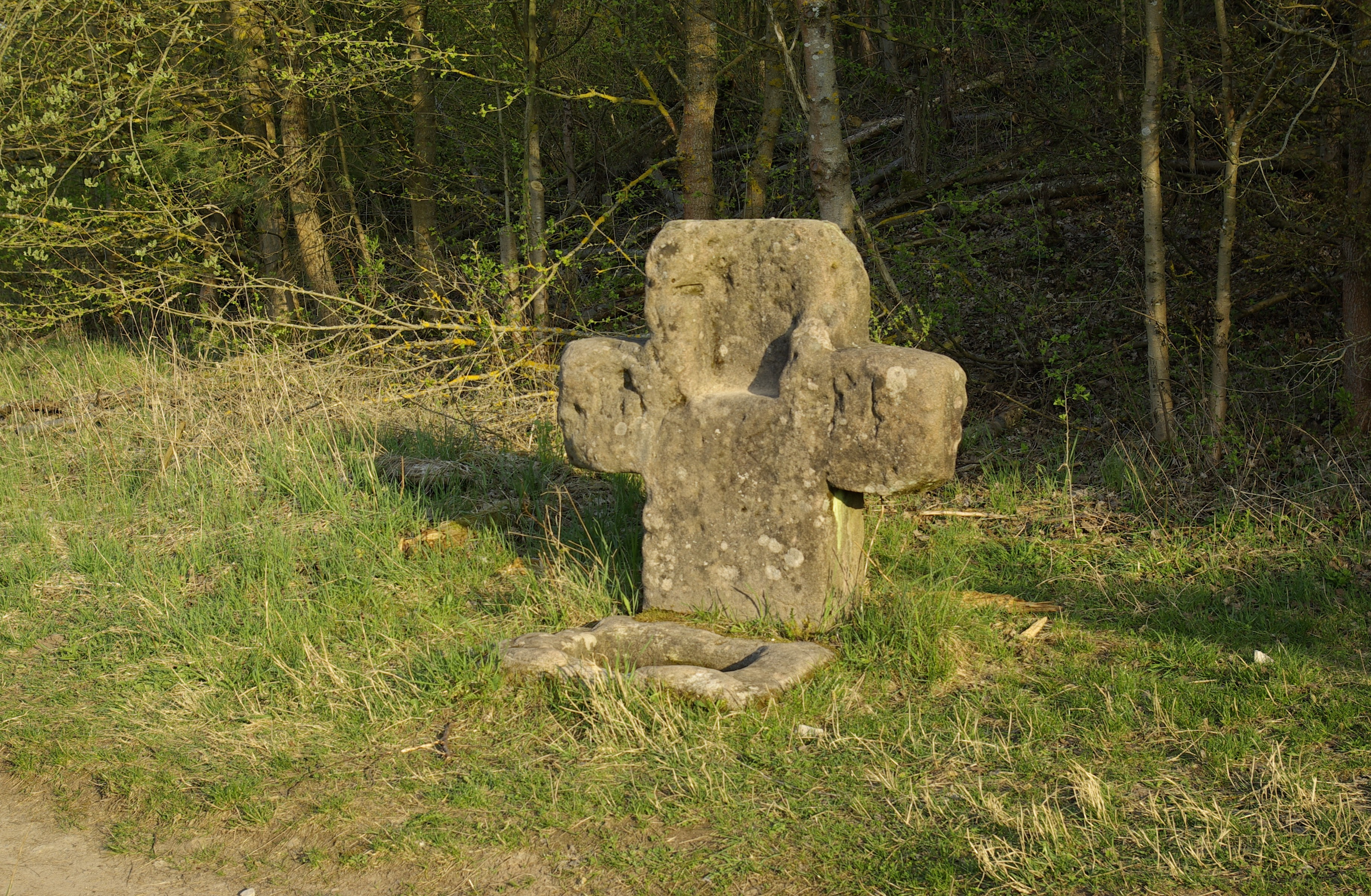 Das Weiße Kreuz, auch Hirschlecke genannt, im Tennenloher Forst im Landkreis Erlangen-Höchstadt. Nicht zu verwechseln mit der weiter nördlich befindlichen Hirschlecke im Buckenhofer Forst.